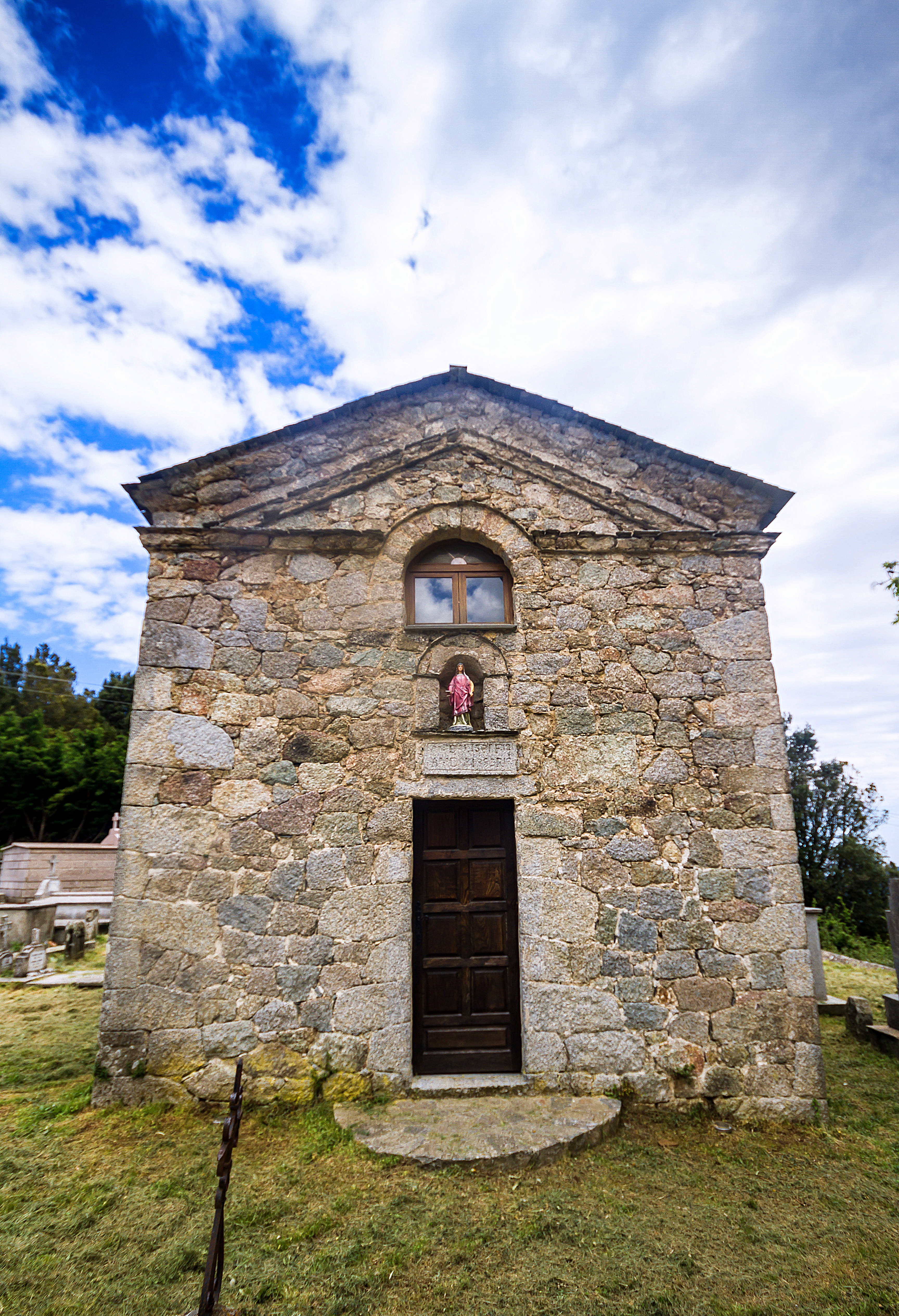 La chapelle Sainte lucie d'Isulacciu di Fiurmorbu